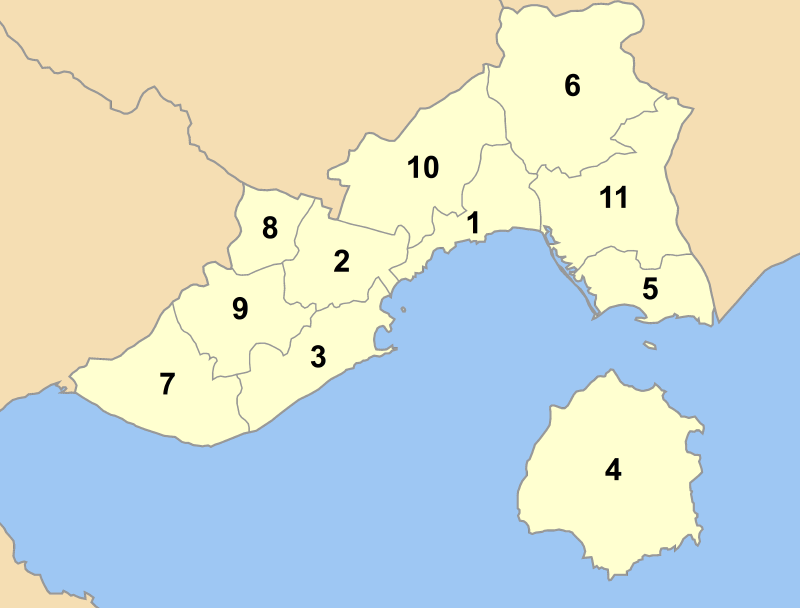 Map of Kavala prefecture (Greece) with administrative divisions (municipalities) numbered in alphabetical order (in greek). Legend: 1. Δήμος Καβάλας - Kavala 2. Δήμος Ελευθερούπολης - Eleftheroupoli 3. Δήμος Ελευθερών - Eleftheres 4. Δήμος Θάσου - Thasos 5. Δήμος Κεραμωτής - Keramoti 6. Δήμος Ορεινού - Orino 7. Δήμος Ορφανού - Orfani 8. Δήμος Παγγαίου - Pangeo 9. Δήμος Πιερέων - Pieris 10. Δήμος Φιλίππων - Filippi 11. Δήμος Χρυσούπολης - Chrysoupoli